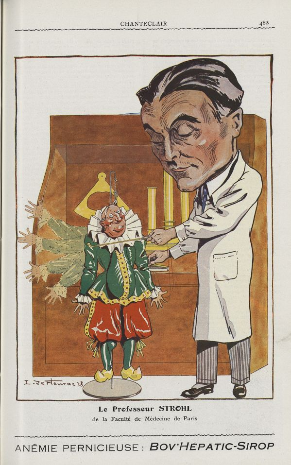 "André Strohl " (portrait charge par F. De Fleurac) Chanteclair . - 1928. - 23e année Pour établir des liens vers ce document, utiliser les URL ci-dessous : Livre : Page : Licence ouverte